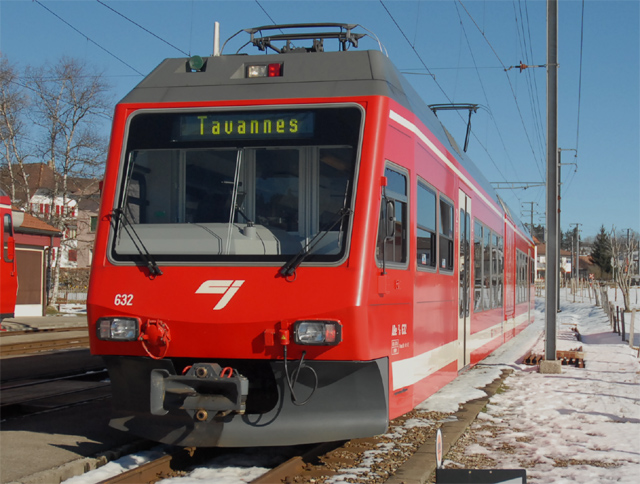 Chemins de fer du Jura treinstel van het type ABe 2/6 632 met de naam: Mont Soleil te Le Noirmont.